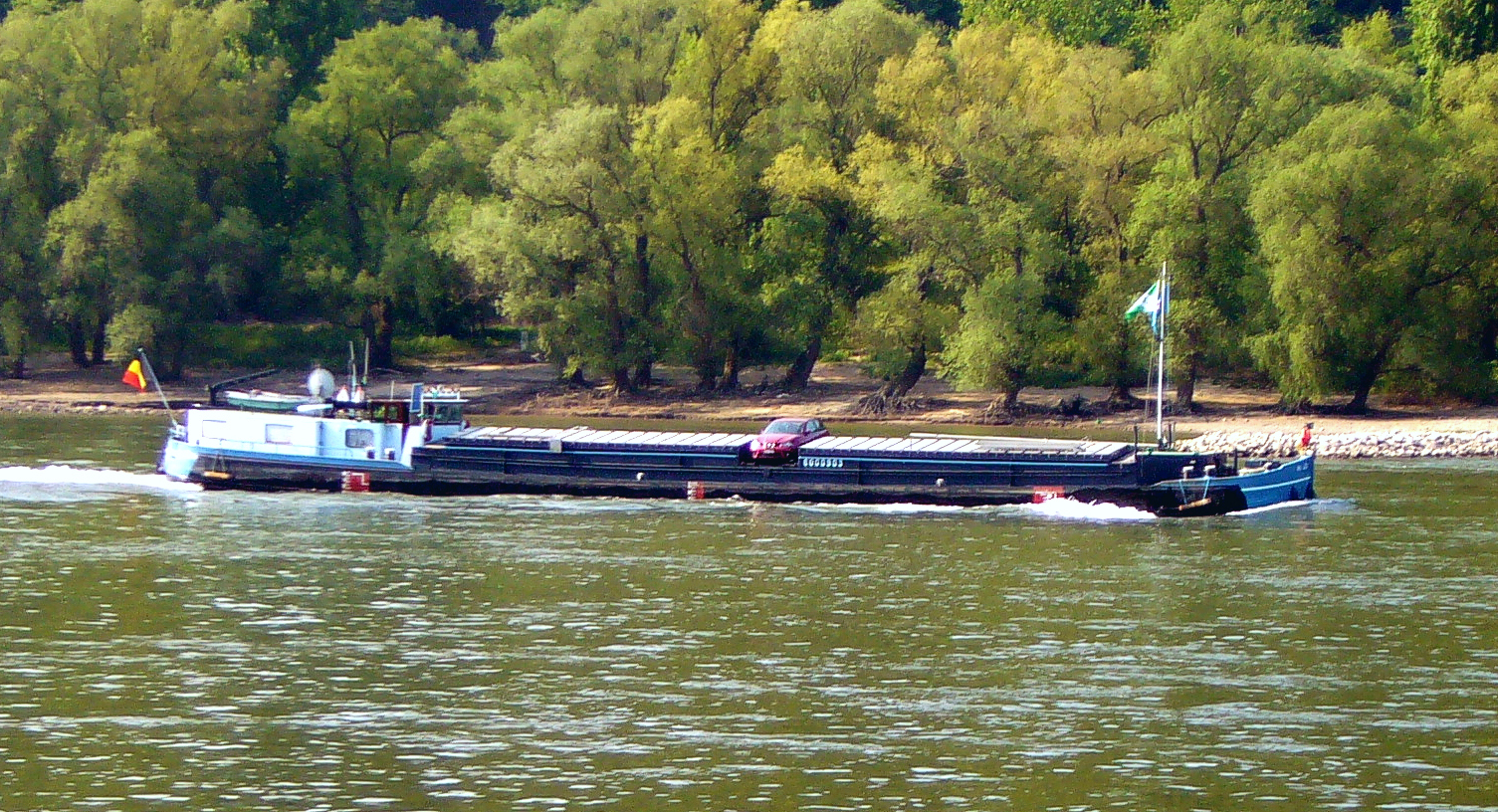 Kanalpeniche